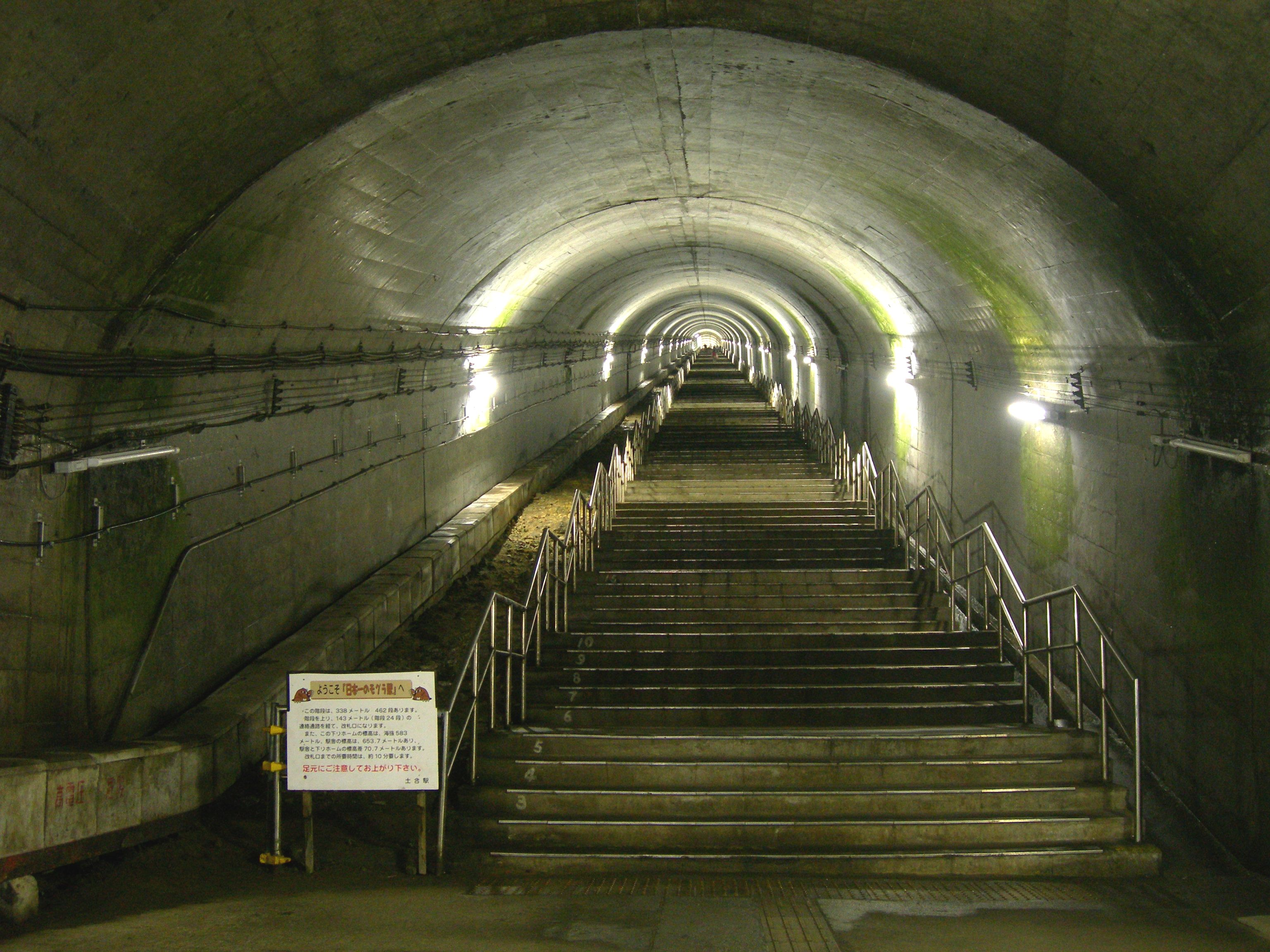 土合駅長岡方面ホームから地上への階段を撮る